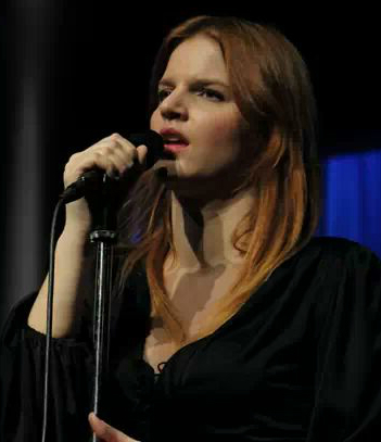 Chiara in concerto a Milano il 20 luglio 2013